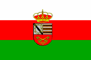 Bandera de Casas de Don Pedro, en Badajoz (España)